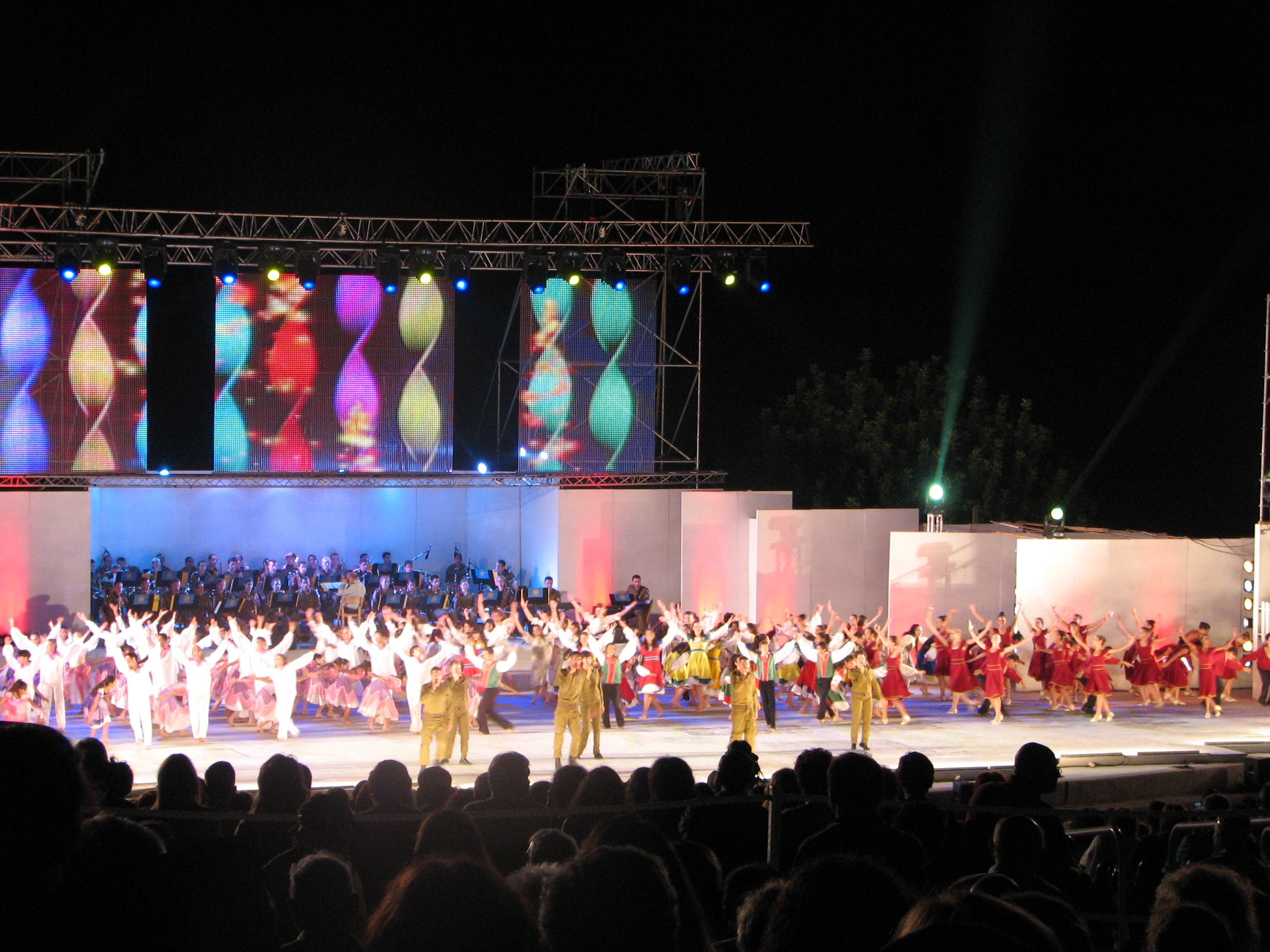 Karmiel Dance Festival, Is an annual dance festival held every summer in the city of Karmiel. The festival was founded in 1987 by two of the greatest authors of folk dance in Israel, Yonatan Carmon and want Hodes. July 2011 Festival פסטיבל מחול כרמיאל הוא פסטיבל מחול שנתי המתקיים בעיר כרמיאל מדי קיץ. הפסטיבל נוסד בשנת 1987 על ידי שניים מגדולי מחברי ריקודי העם בארץ, יונתן כרמון ותרצה הודס. אורכו של פסטיבל המחולות הוא שלושה ימים, ובמהלכו גודשים את העיר המוני אנשים, הצופים במגוון רב של הופעות רקדנים מהארץ ומחו"ל. צילומים מפסטיבל יולי 2011